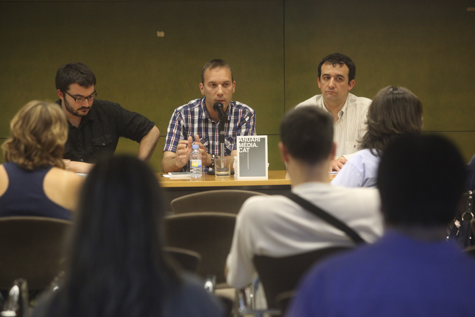 Presentació de l'Anuari Mèdia.cat a Vic, el juny del 2012. Roger Palà, David Bassa i Jordi Vilarrodà, a la seu del Col·legi d'Arquitectes de Vic